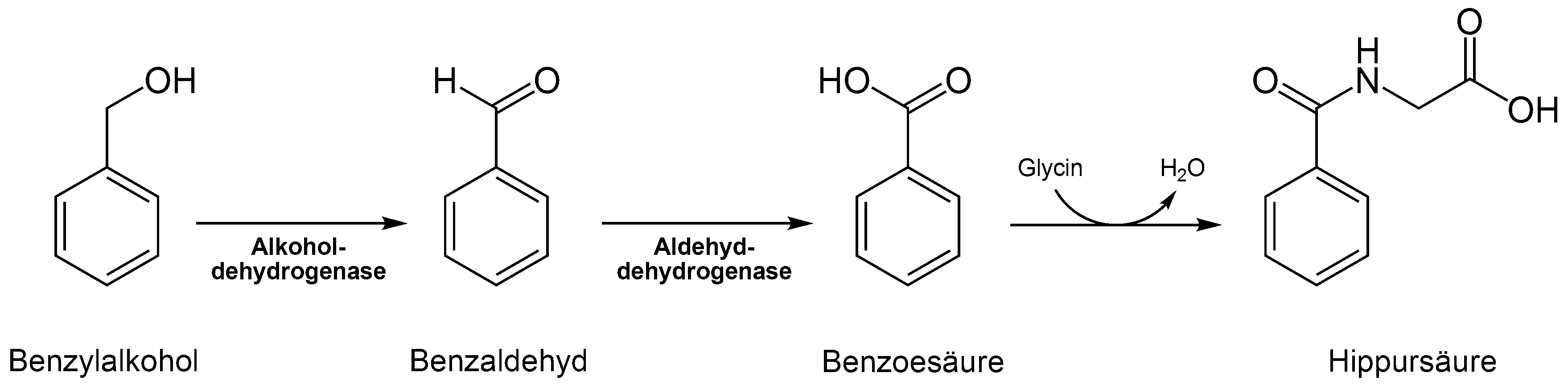 Umsetzung von Toluol zu Hippursäure